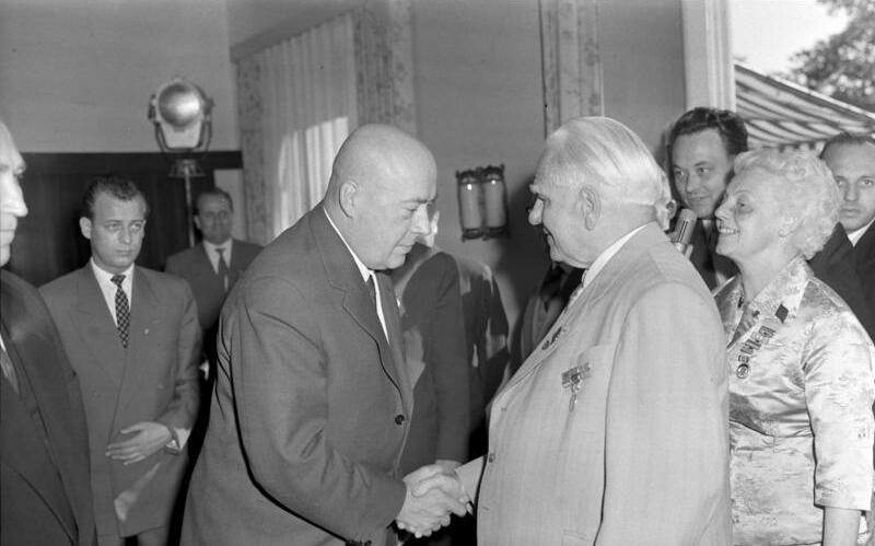 Berlin, 10. Jahrestag DDR-Gründung, Pieck Zentralbild/Heilig, 8.10.1959 10 Jahre DDR Präsident Wilhelm Pieck empfing Leiter ausländischer Delegationen Der Präsident der DDR, Wilhelm Pieck, empfing am 8.10.1959 in seinem Sommersitz bei Berlin die Leiter von ausländischen Delegationen, die anlässlich der Feierlichkeiten zum 10. Jahrestag der Gründung der DDR in der Republik weilen. Der Empfang verlief in einer überaus herzlichen Atmosphäre. UBz: Mit freundschaftlichem Händedruck begrüßte Präsident Wilhelm Pieck das Mitglied des Politbüros der Polnischen Vereinigten Arbeiterpartei, den Vorsitzenden des Ministerrats der Volksrepublik Polen, Jozef Cyrankiewicz. Abgebildete Personen: Pieck, Wilhelm: Präsident, Politbüro der SED, Vorsitzender der KPD, DDR Cyrankiewicz, Józef: Ministerpräsident, Mitglied des Weltfriedensrates, Polen